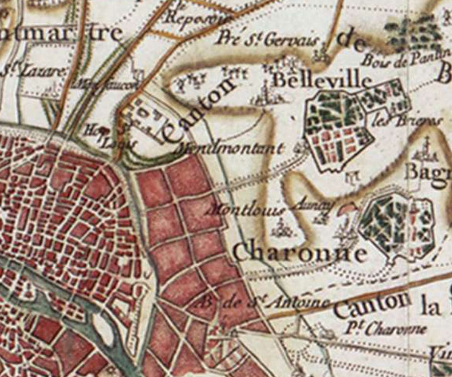 Ménilmontant, Paris (France) - Carte de Cassini, vers 1780